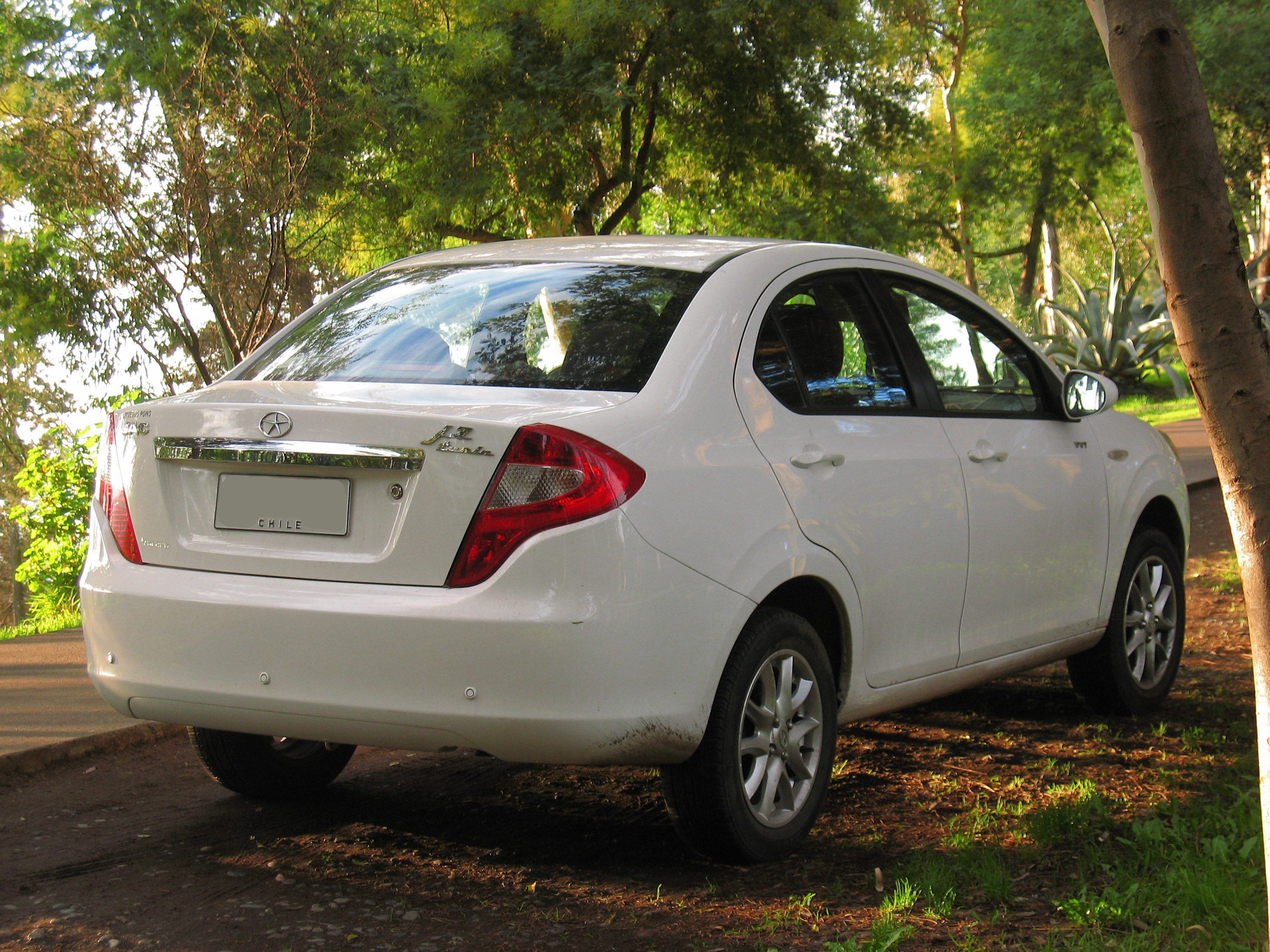 JAC J3 Turin 1.3 2014